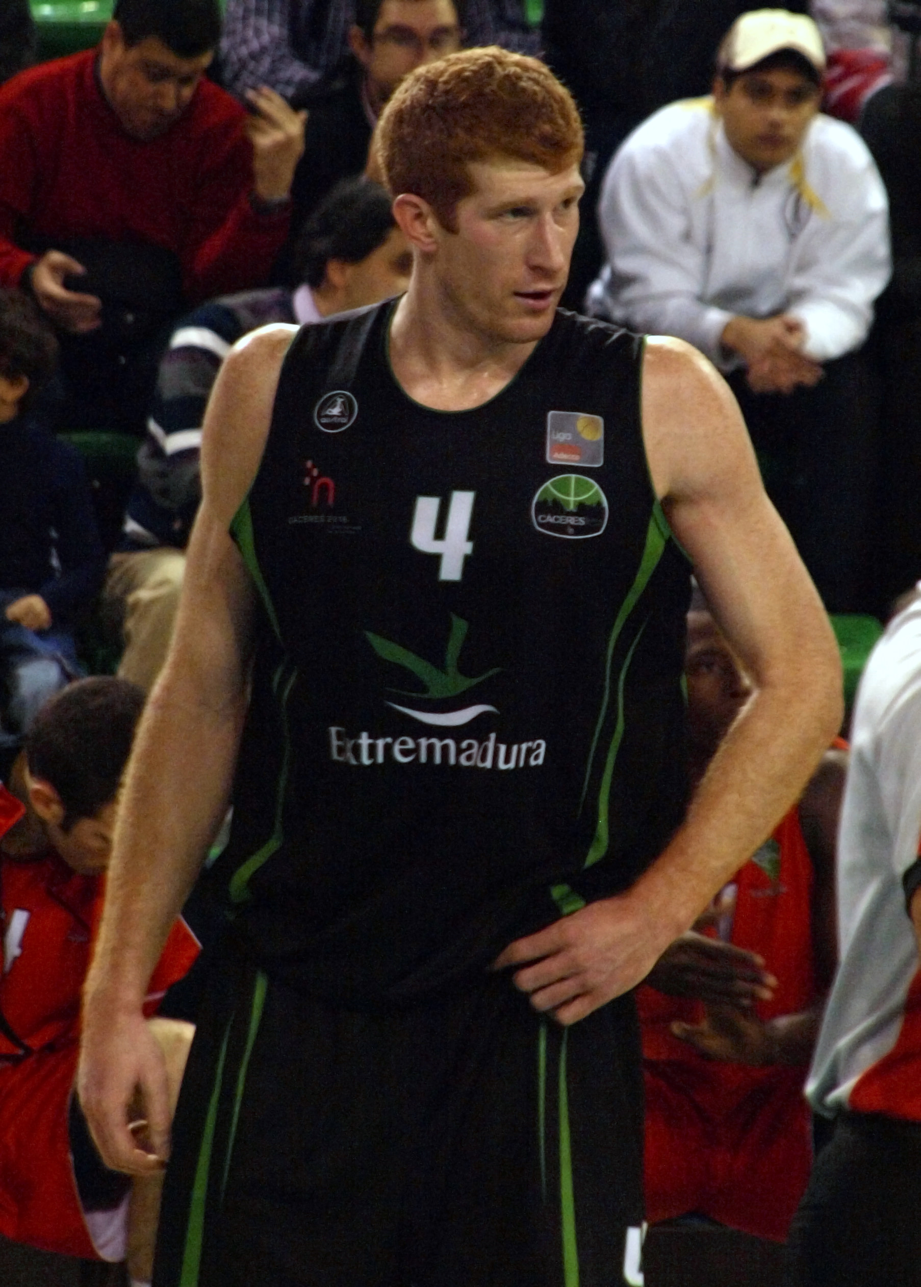 Drew Naymick con la camiseta del Cáceres 2016 en un partido de la Adecco LEB Oro ante el UB La Palma de la temporada 2009/10